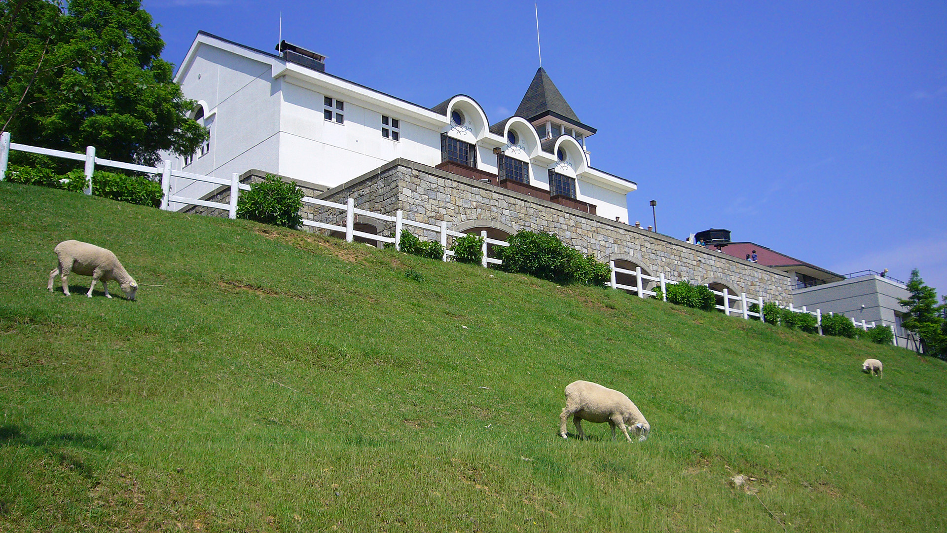 Rokkosan Pasture in Kobe, Japan